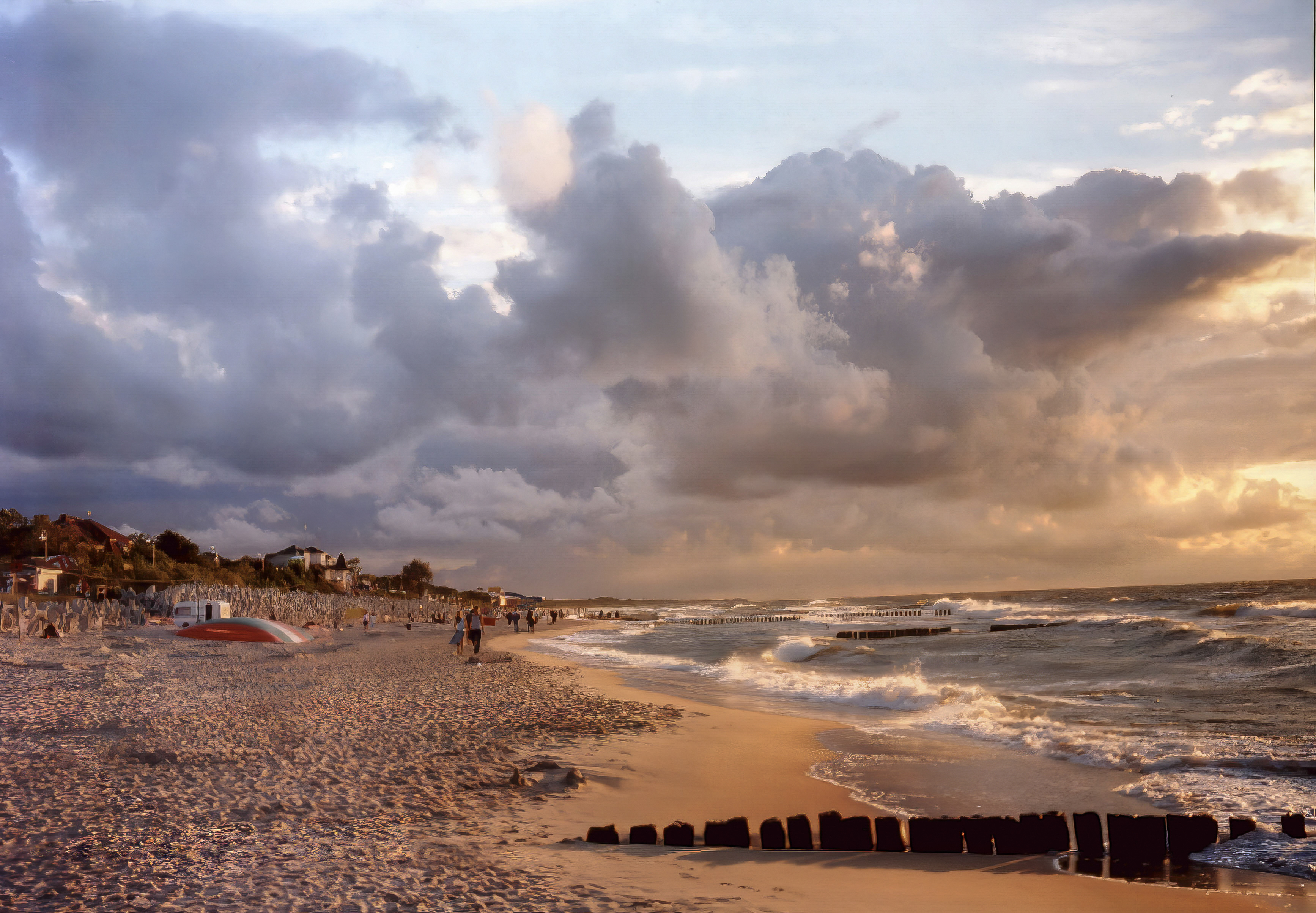 autor: Krzysztof STIMOROLL Popławski title: Mielno - Plaża / Mielno - beach